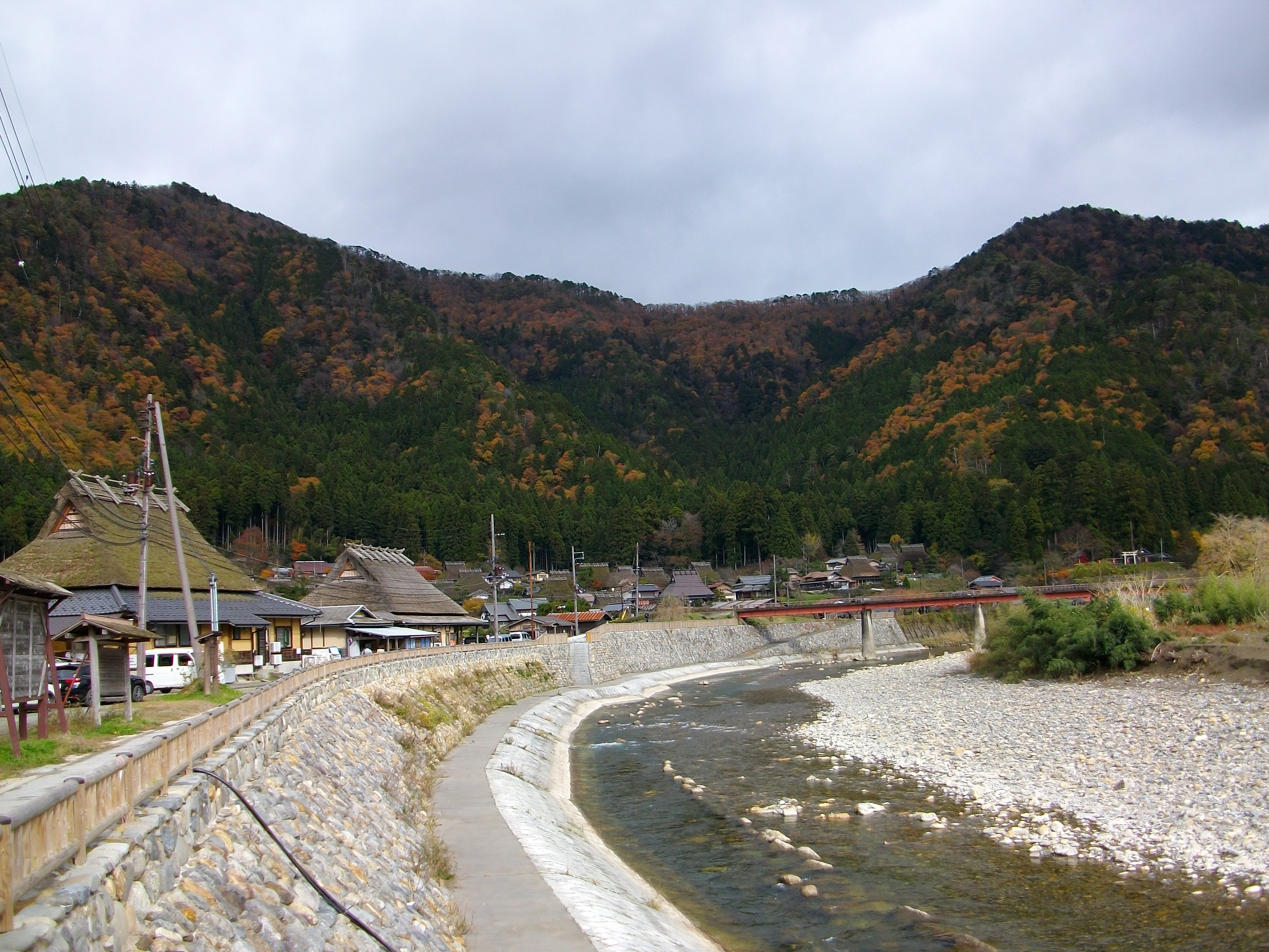 かやぶきの里・北村脇を流れる由良川、護岸保護のため堤防が石垣で積み上げてコンクリートで固めています。